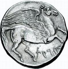 Карфагенская монета времён 1-й Пунической войны с изображением Пегаса и финикийской легендой, реверс